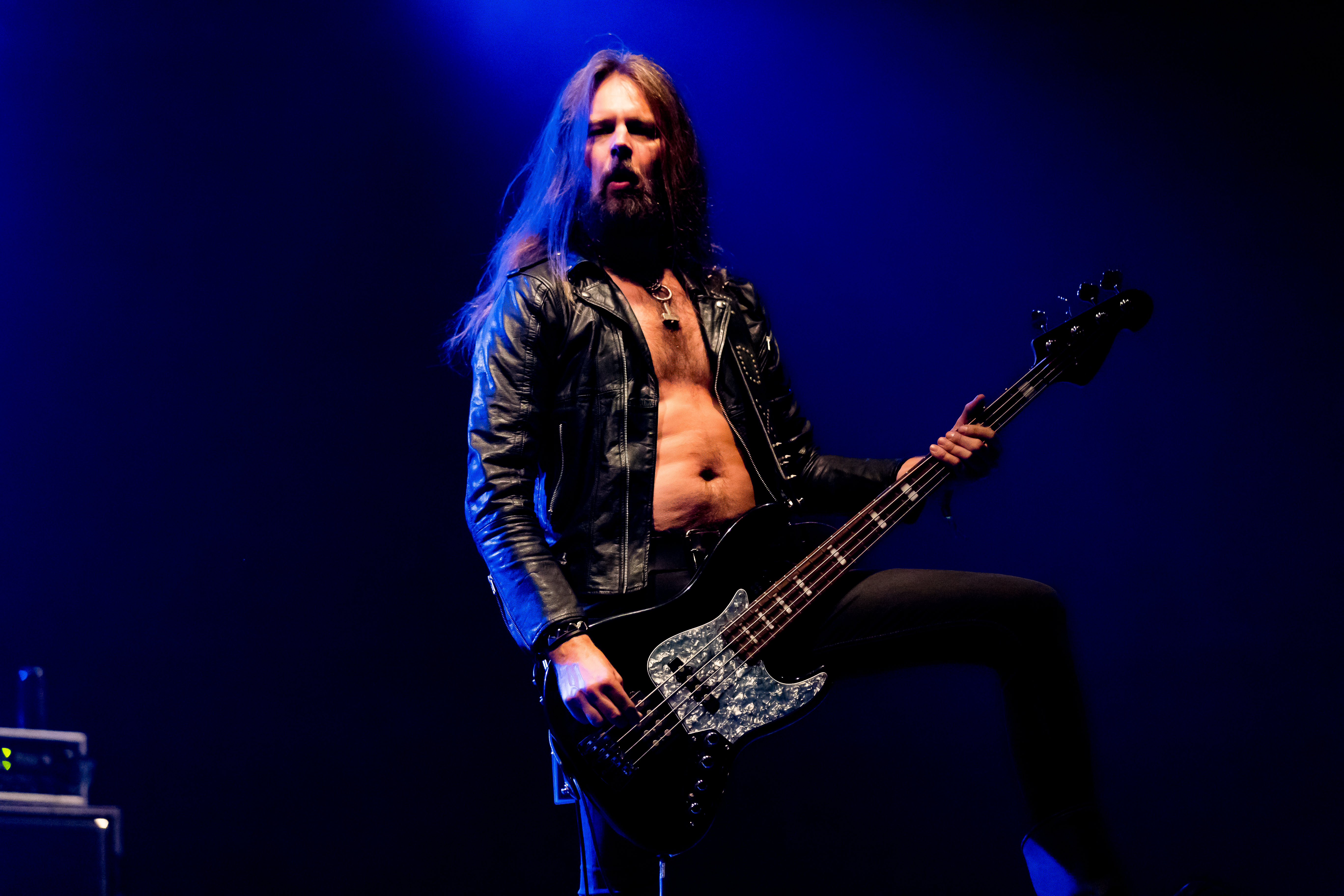 Grand Magus during Summer Breeze 2016 at , Dinkelsbühl, Bayern, Germany on 2016-08-17, Photo: Sven Mandel